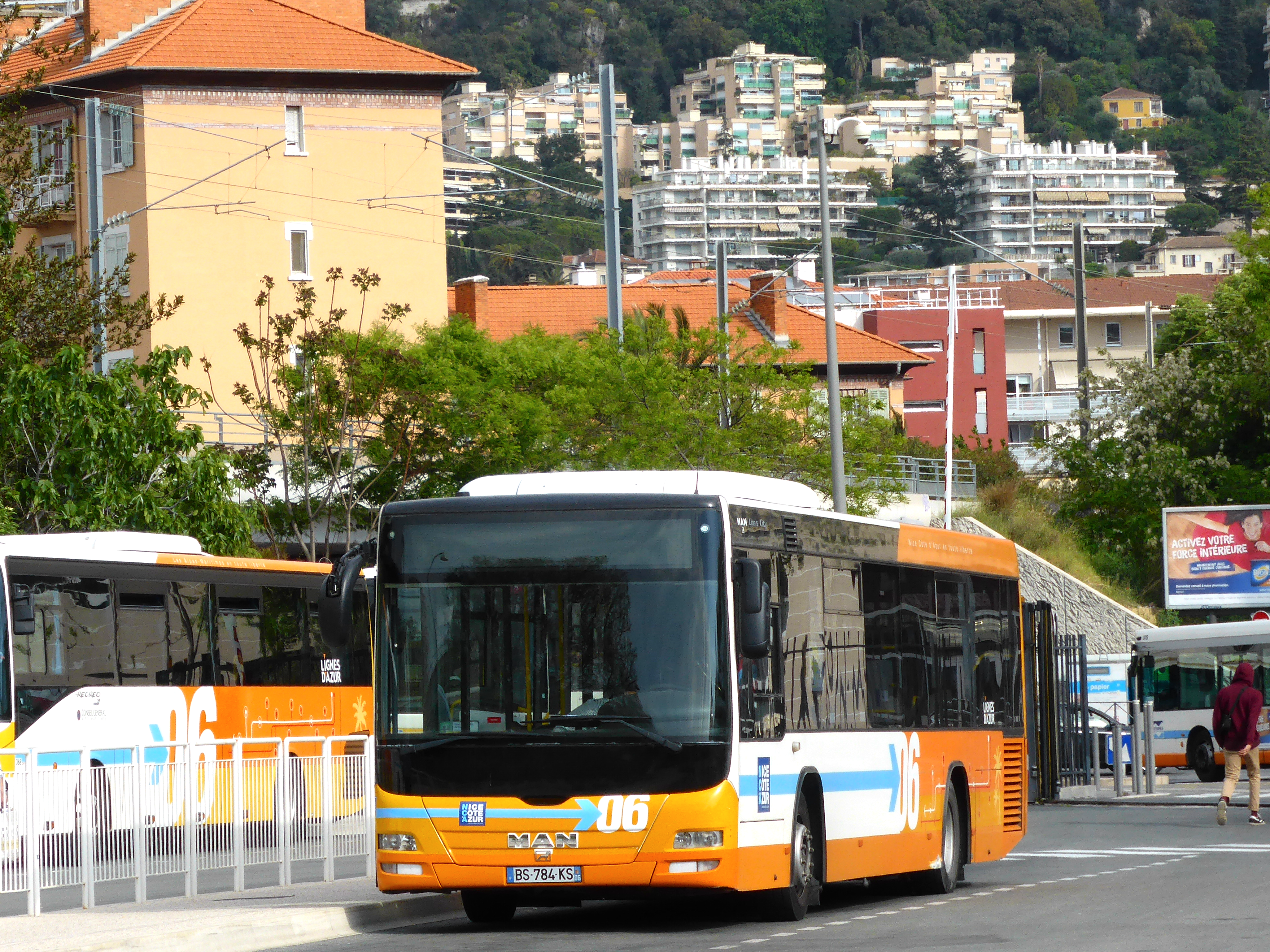 Un bus MAN du réseau Lignes d'Azur à la gare routière de Nice Vauban